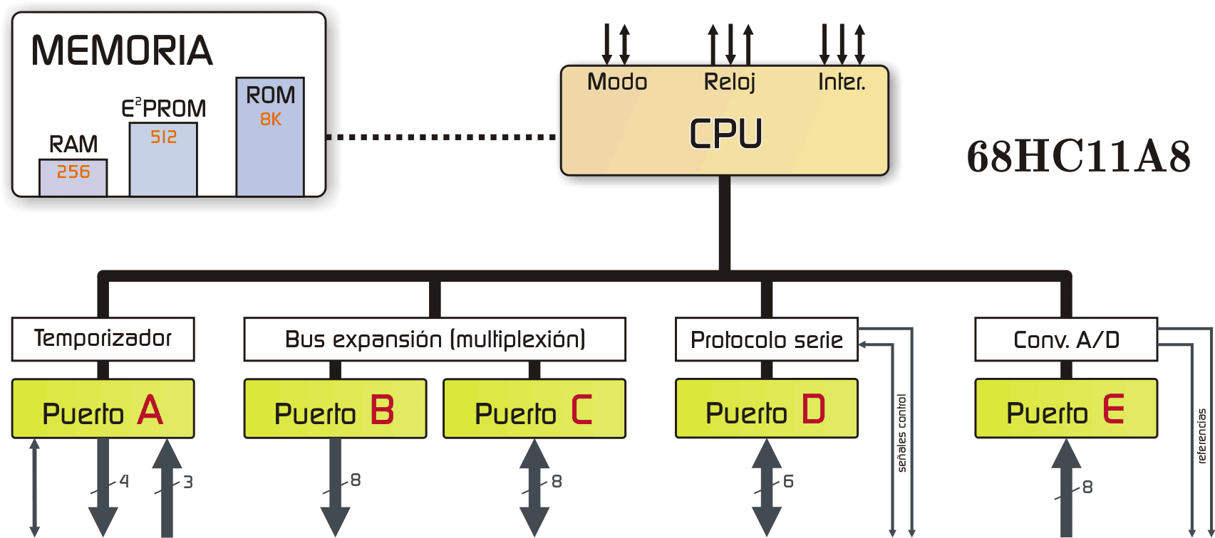 Diagrama de bloques del microcontrolador MC68HC11 (A8) v1.0